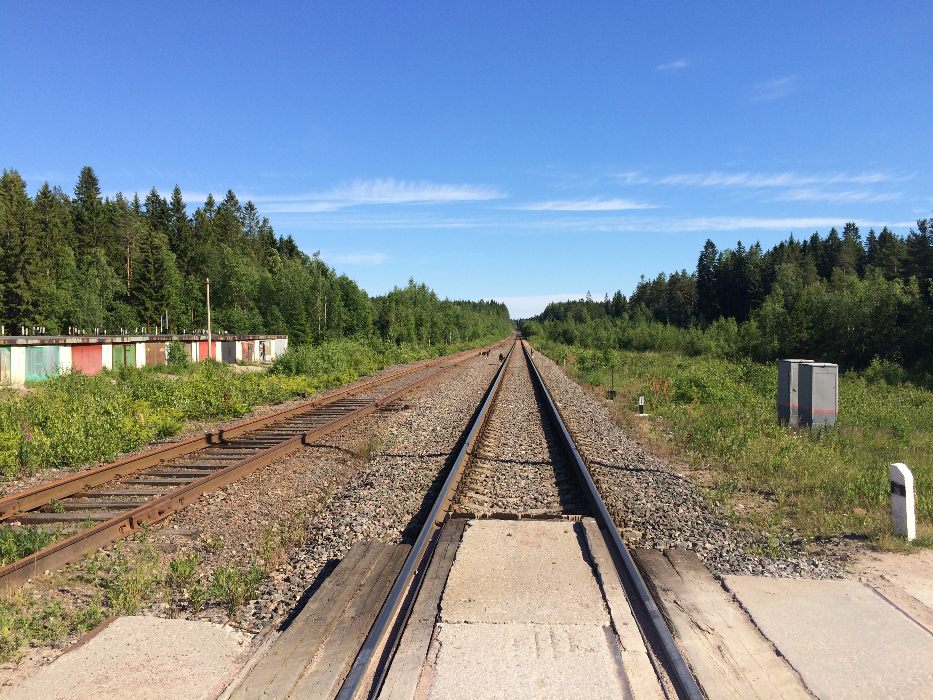 оп Хаймио